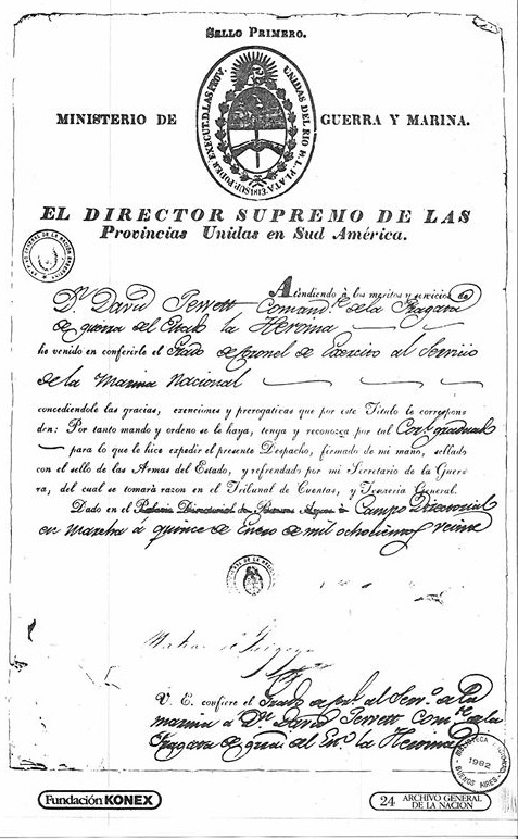 Jewett era coronel del ejército al servicio de la Marina Nacional Argentina, tal como figura en los archivos de su nombramiento por parte de las Provincias Unidas del Rio de la Plata, actual Argentina, en 1820.